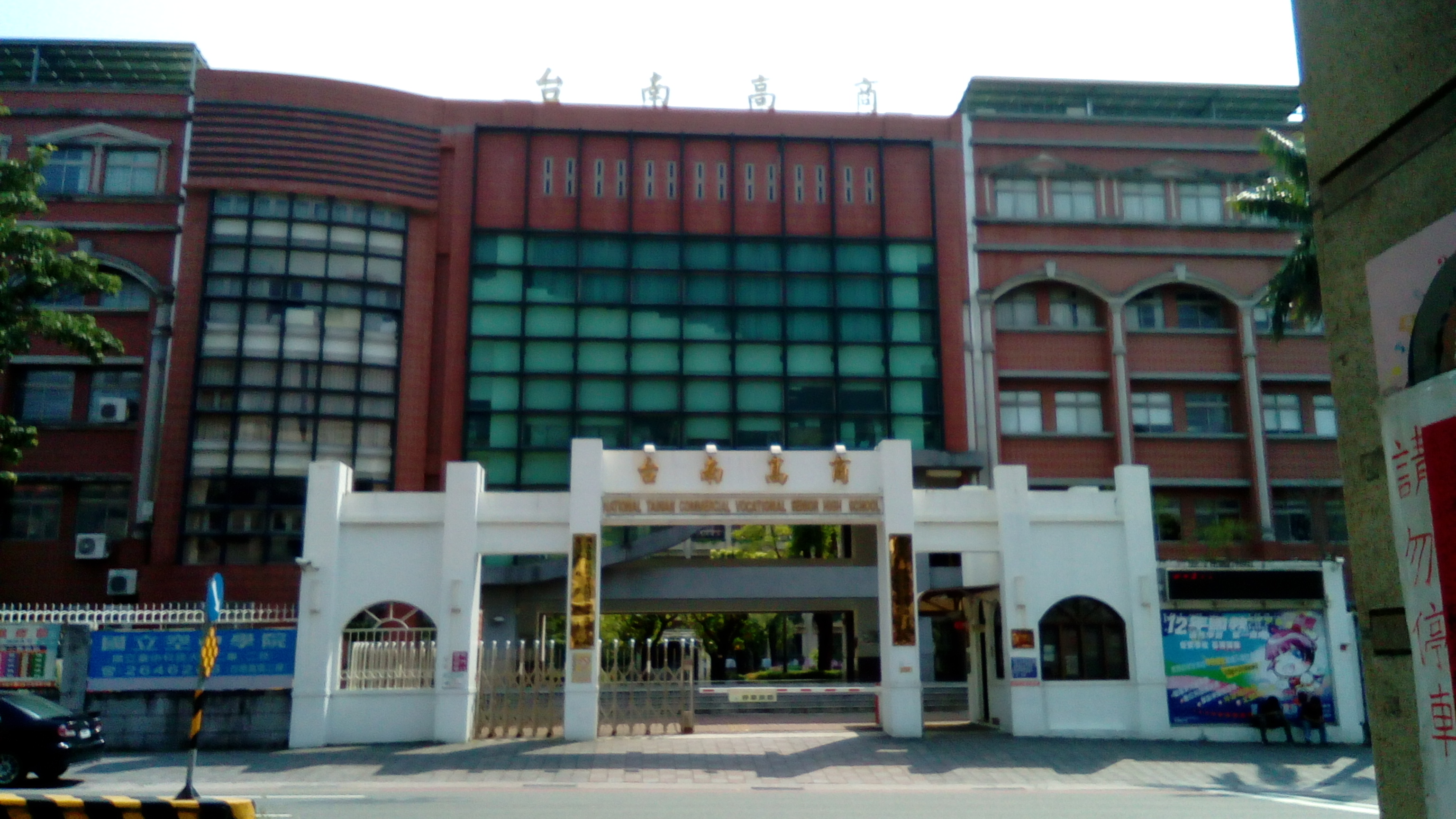 健康路二段上